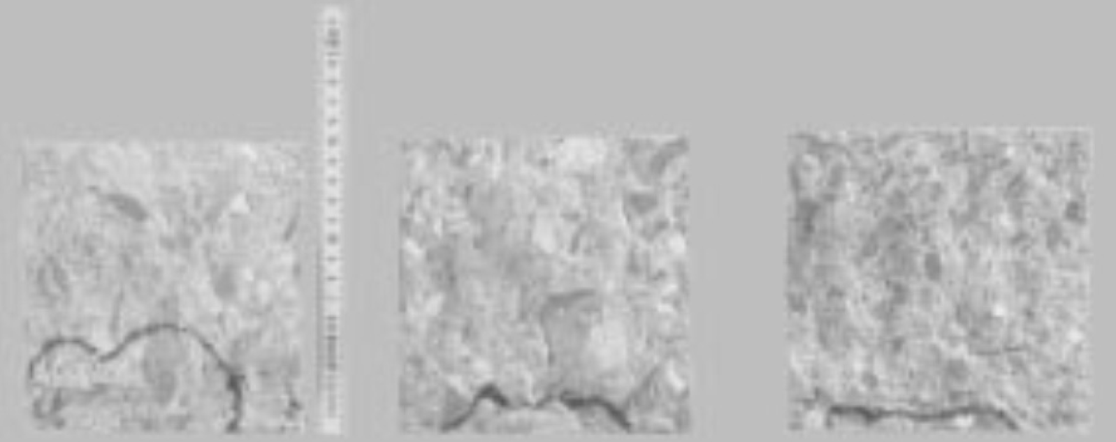 Vandens įsiskverbimas į bandinius